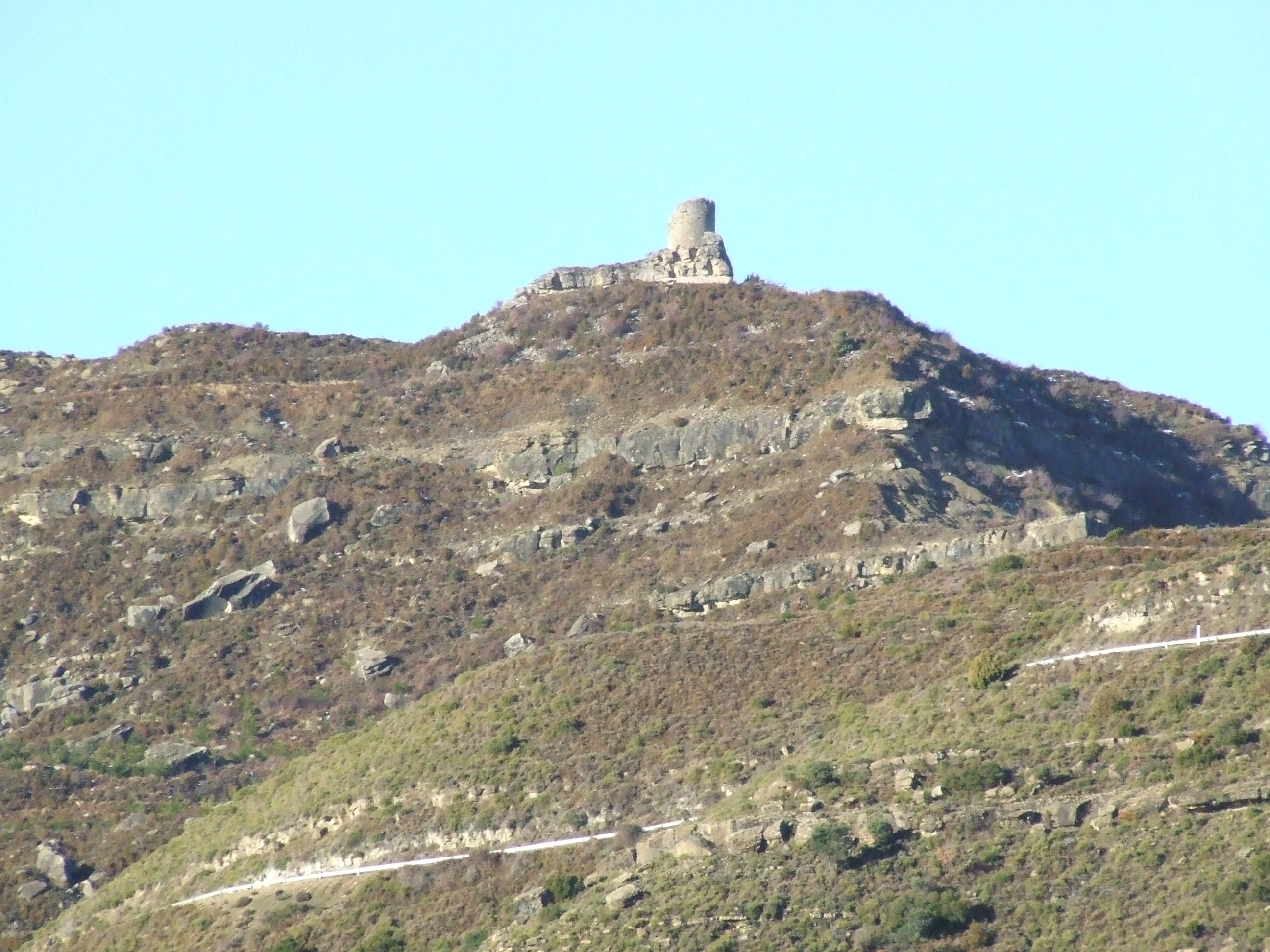 Montllobar (Fígols de Tremp, Tremp, Pallars Jussà)